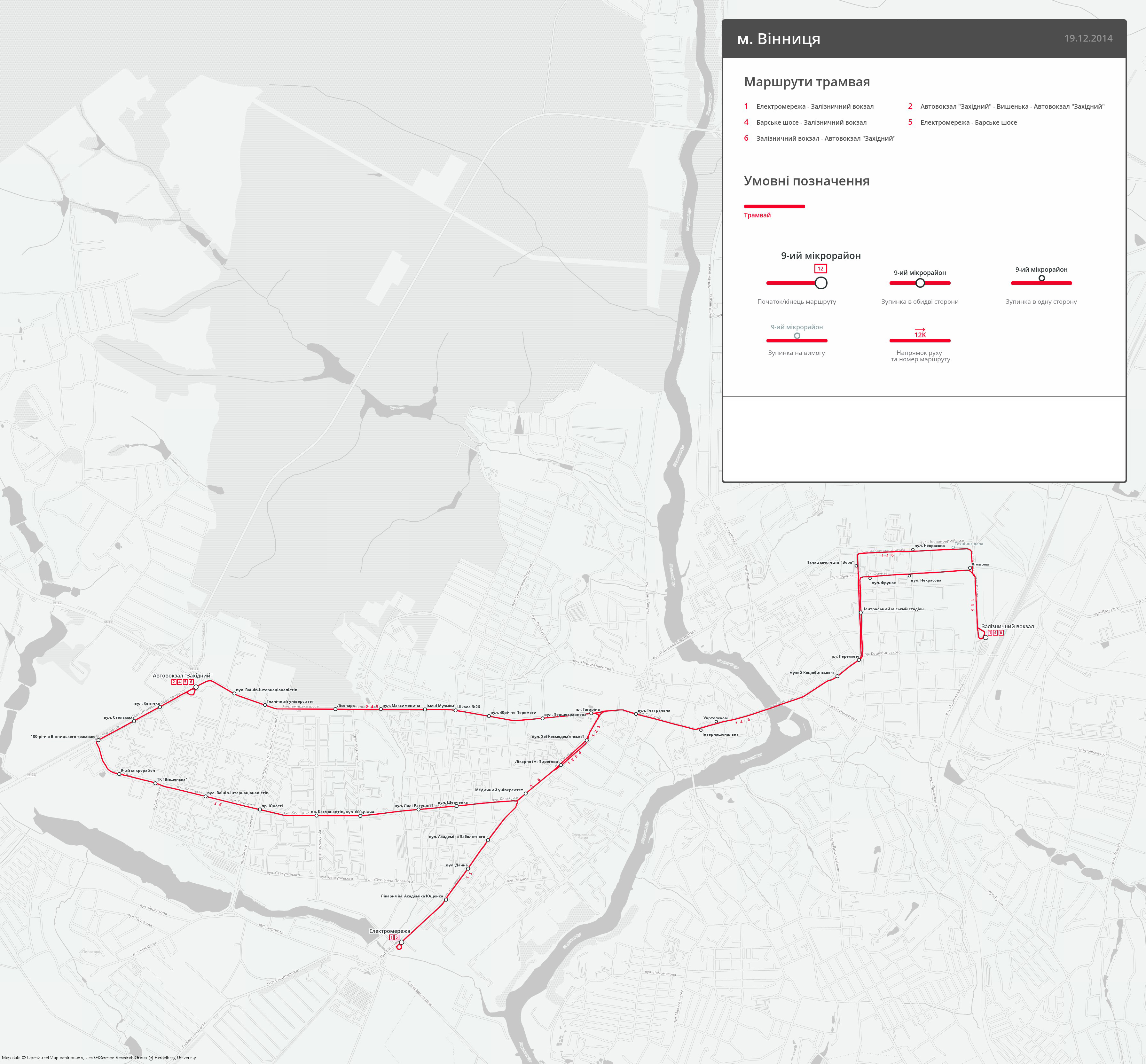 Схема трамвайних маршрутів у місті Вінниця